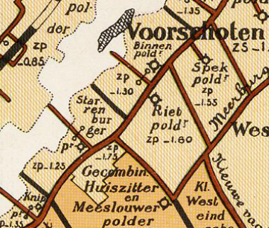 Starrenburgerpolder